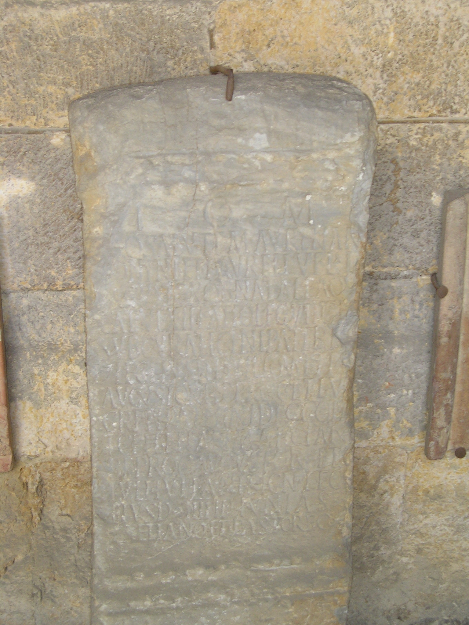 Ara votiva procedente de San Cristobal (León) depositada en el patio del Museo de la Basílica de san Isidoro de León, correspondiente con la inscripción CIL II 2552 = AE 1910, 3 = AE 1928, 176 = AE 1967, 242, cuyo texto dice: I(ovi) O(ptimo) M(aximo)/ [p]ro salute M(arci) Aureli An/[t]onini et L(uci) Aureli Veri/ [A]ugustor(um) ob natale(m) Aqu[i]/lae vexillatio leg(ionis) VII G(eminae) F(elicis)/ sub cura Licini Patern[i]/ )(centurionis) leg(ionis) eiusd(em) et Hermetis/ Augustor(um) lib(erti) proc(uratoris) et Lu/creti Paterni dec(urionis) coh(ortis)/ I Celt(iberorum) et Fabi Marcian[i]/ b(ene)f(iciarii) proc(uratoris) Augustor(um) et/ Iuli Iuliani sign(iferi) leg(ionis)/ eiusd(em) IIII Id(us) Iunias / Laeliano et Pastore co(n)s(ulibus)